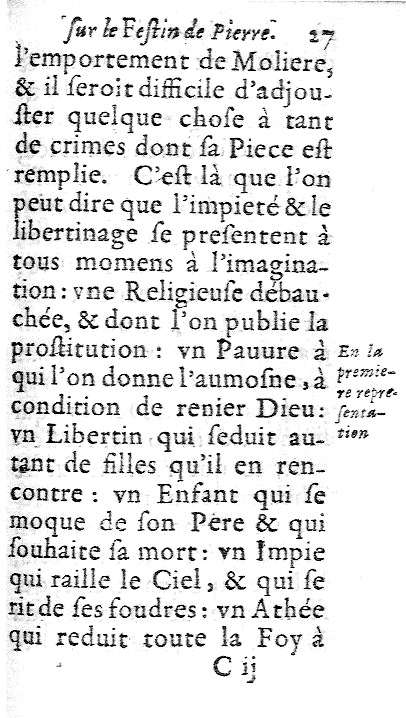 Les Observations de Rochemont, p. 27